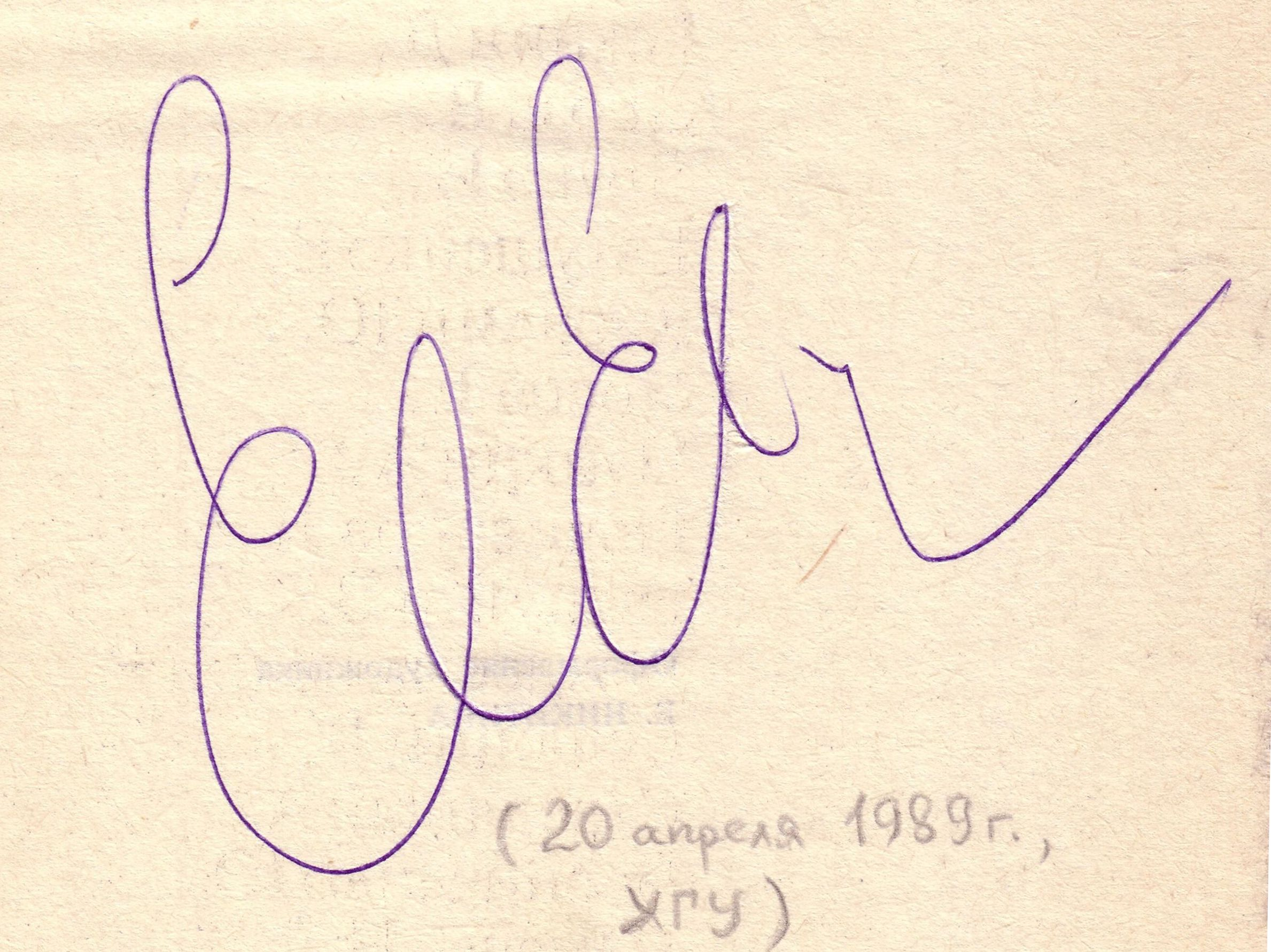 Автограф Евгения Евтушенко, тогда известного советского поэта, на книге, где он соавтор Притерпелость // Если по совести. Сборник статей про перестройку / Евтушенко Е.. — Москва: Художественная литература, 1988. — С. 142. — 400 с. — 100 000 (доп.) экз. — ISBN 5-280-00872-9. 20 апреля 1989, Харьков, Харьковский государственный университет.